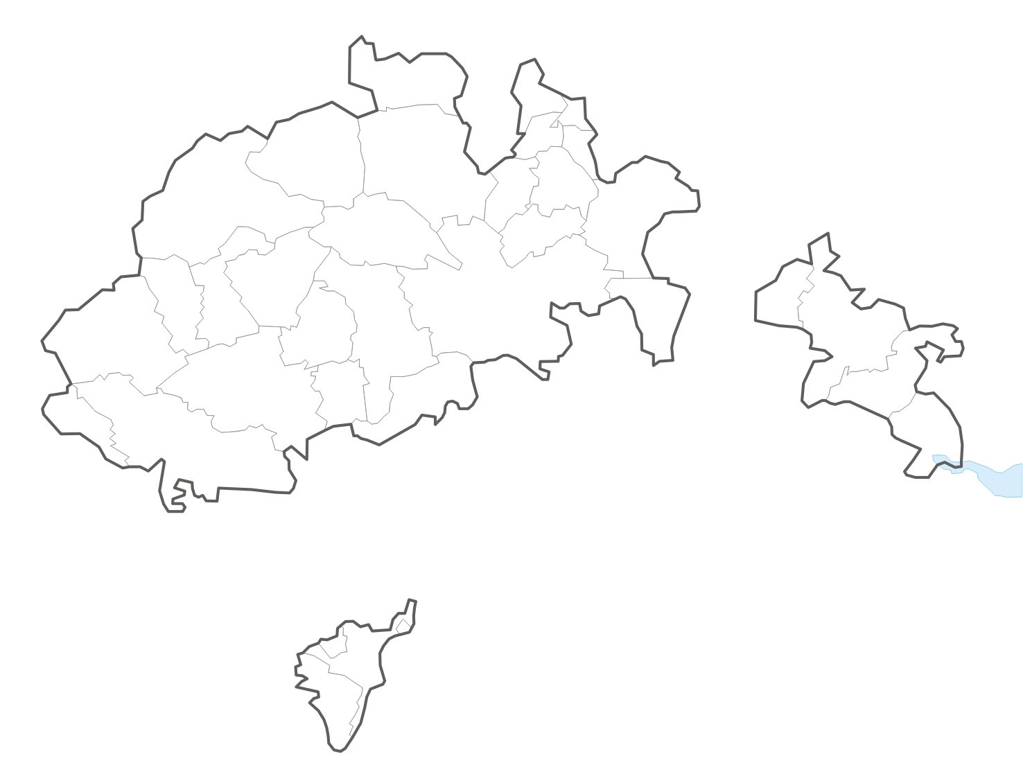 Municipalities in Canton Schaffhausen / Gemeinden des Kantons Schaffhausen